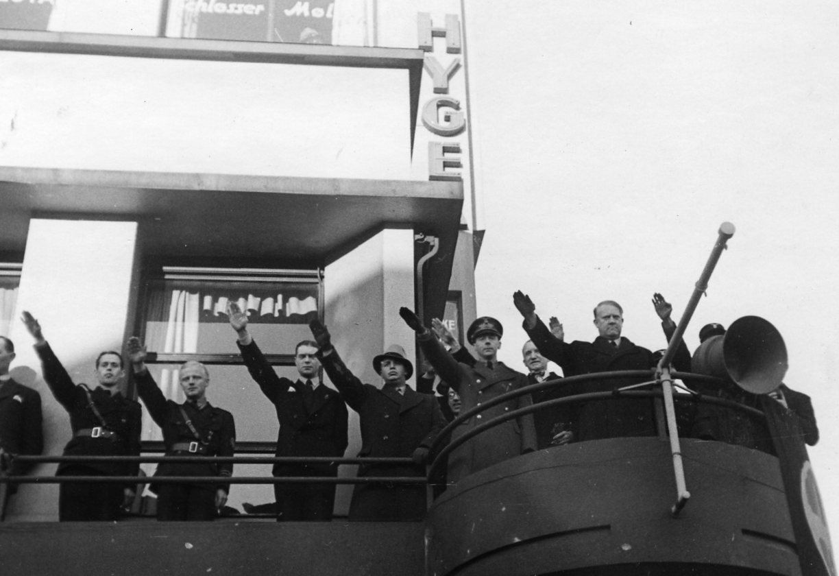 RA/RAFA-3309/U 38B/10/38-10-20 img148 Nasjonal Samling, forkortet NS, var et norsk politisk parti som ble grunnlagt av Vidkun Quisling i 1933 og ble oppløst ved frigjøringa i 1945. Ideologisk fulgte partiet den tyske nasjonalsosialismen tett, og NS ble støtteorganisasjon for den tyske okkupasjonsmakta i Norge under andre verdenskrig.